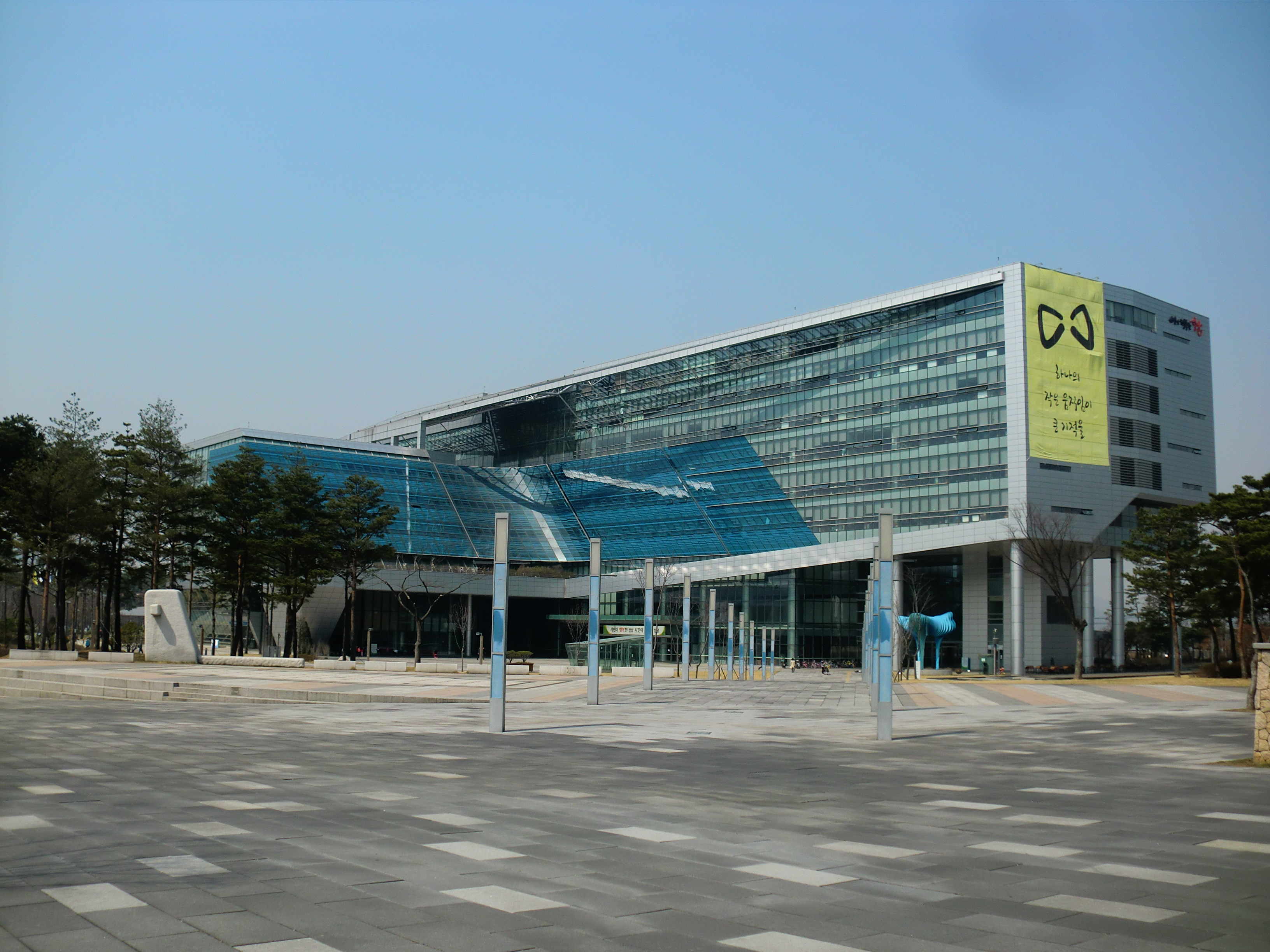 경기도 성남시에 있는 성남시청